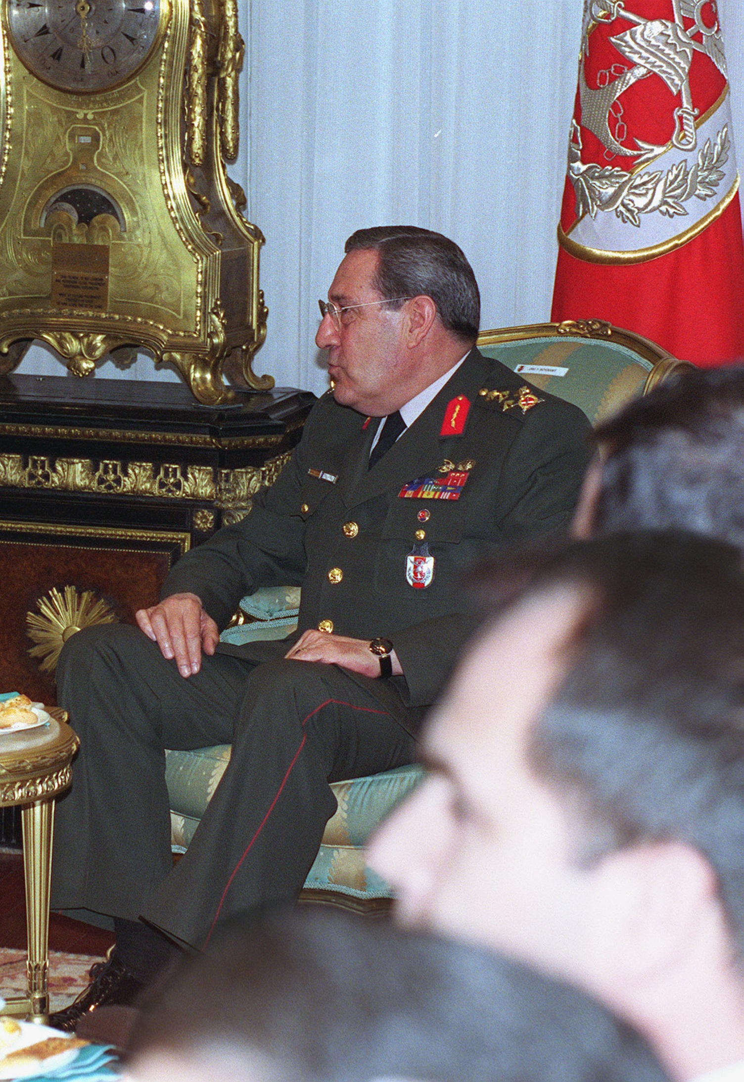 Türk Silahlı Kuvvetleri'nin 25. Genelkurmay Başkanı Yaşar Büyükanıt.